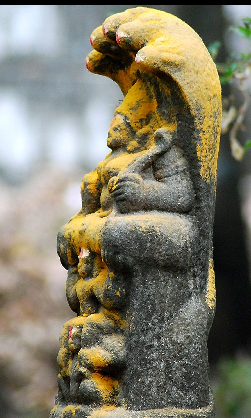 Sarpa Kavu at Sakthanthamburan palace, Thrissur, Kerala, India.